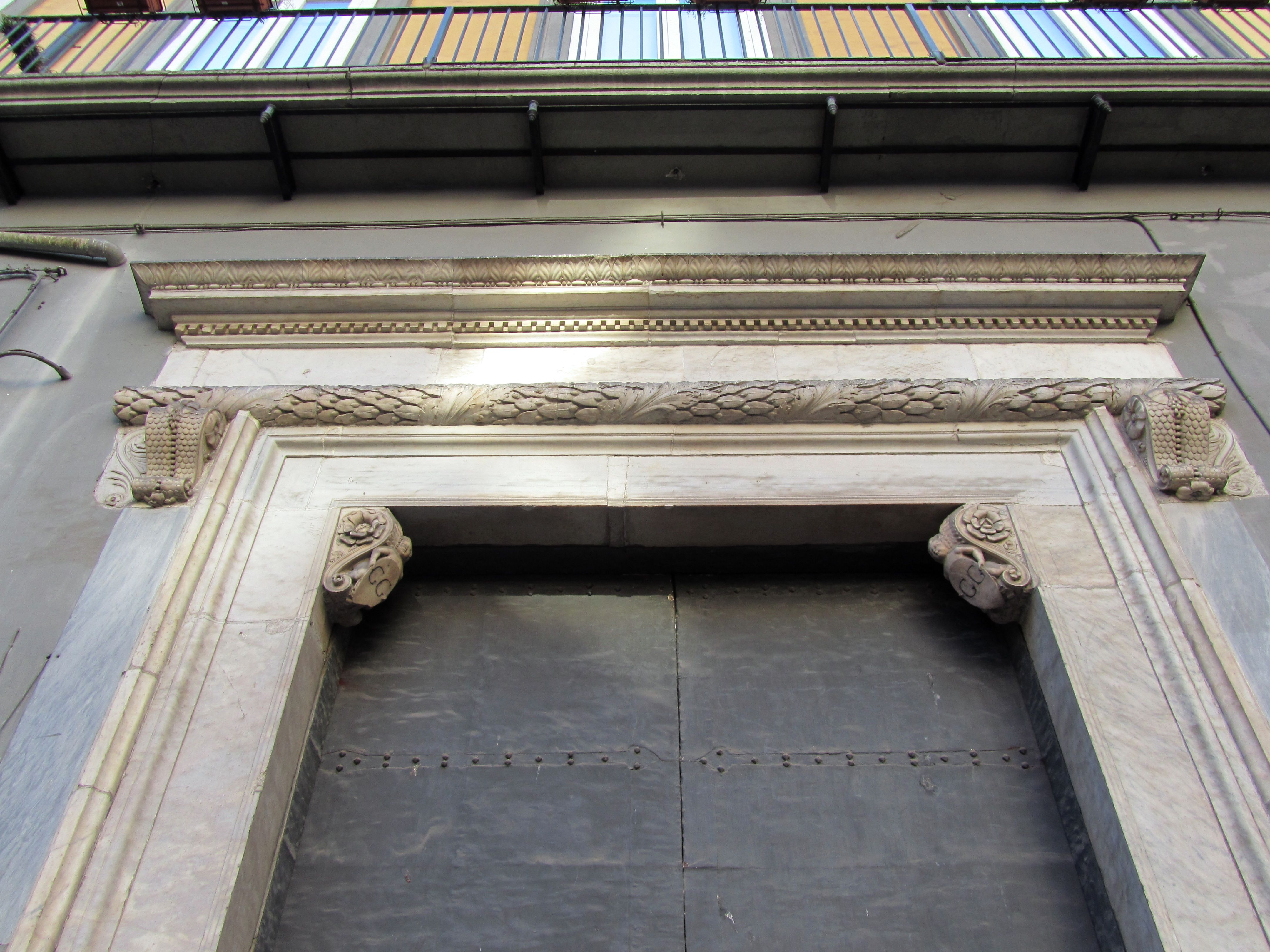 Particolare del portone quattrocentesco del Palazzo Petrucci (Napoli)